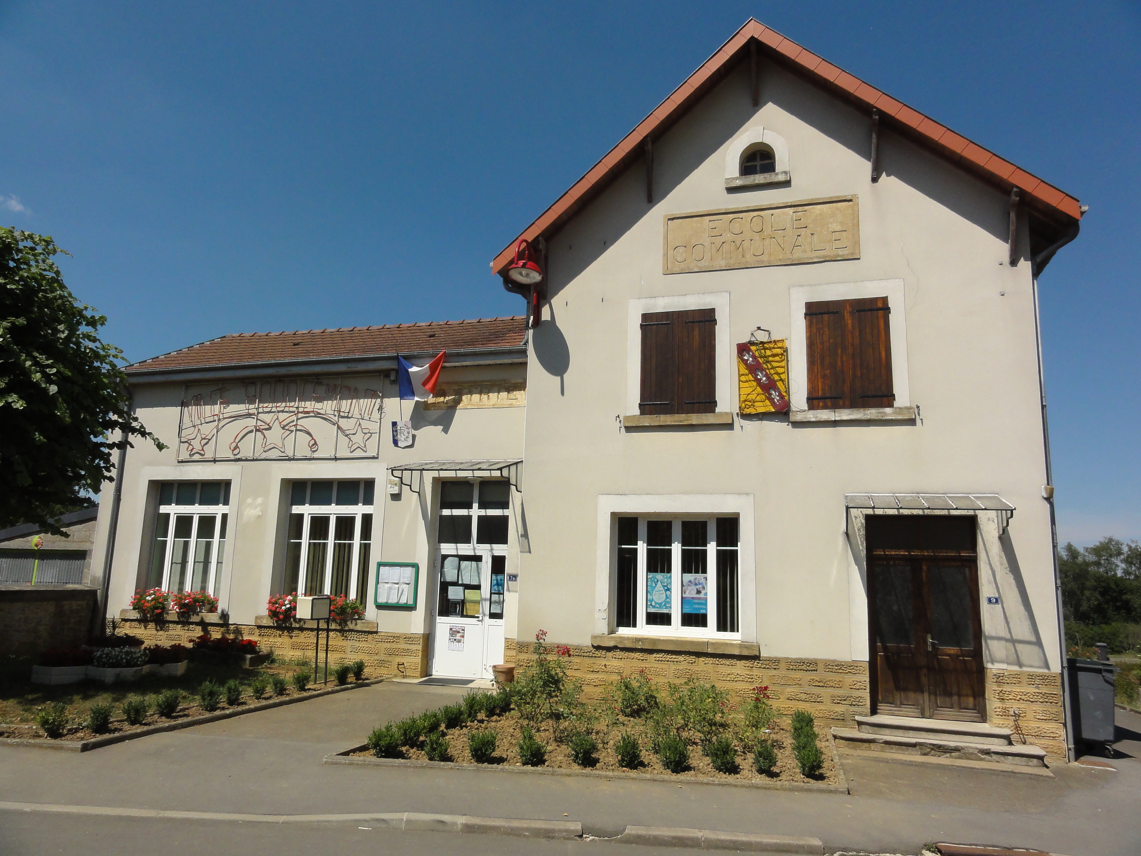 Ville-Houdlémont (Meurthe-et-M.) mairie-école